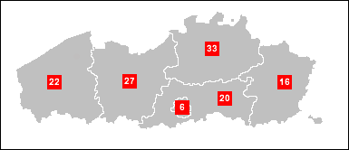 Zetelverdeling over de zes kieskringen voor Vlaamse parlementsverkiezingen